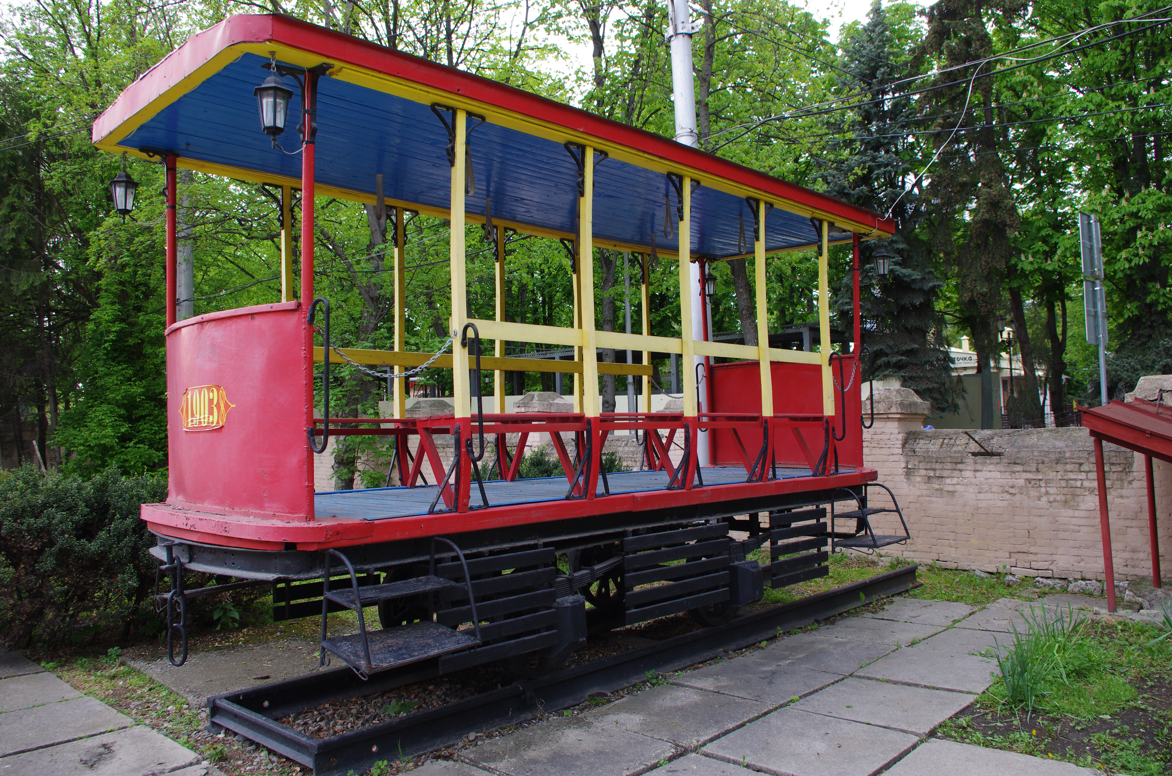 Первый пятигорский трамвай (прицепной вагон) - памятник на территории трамвайного депо в Пятигорске